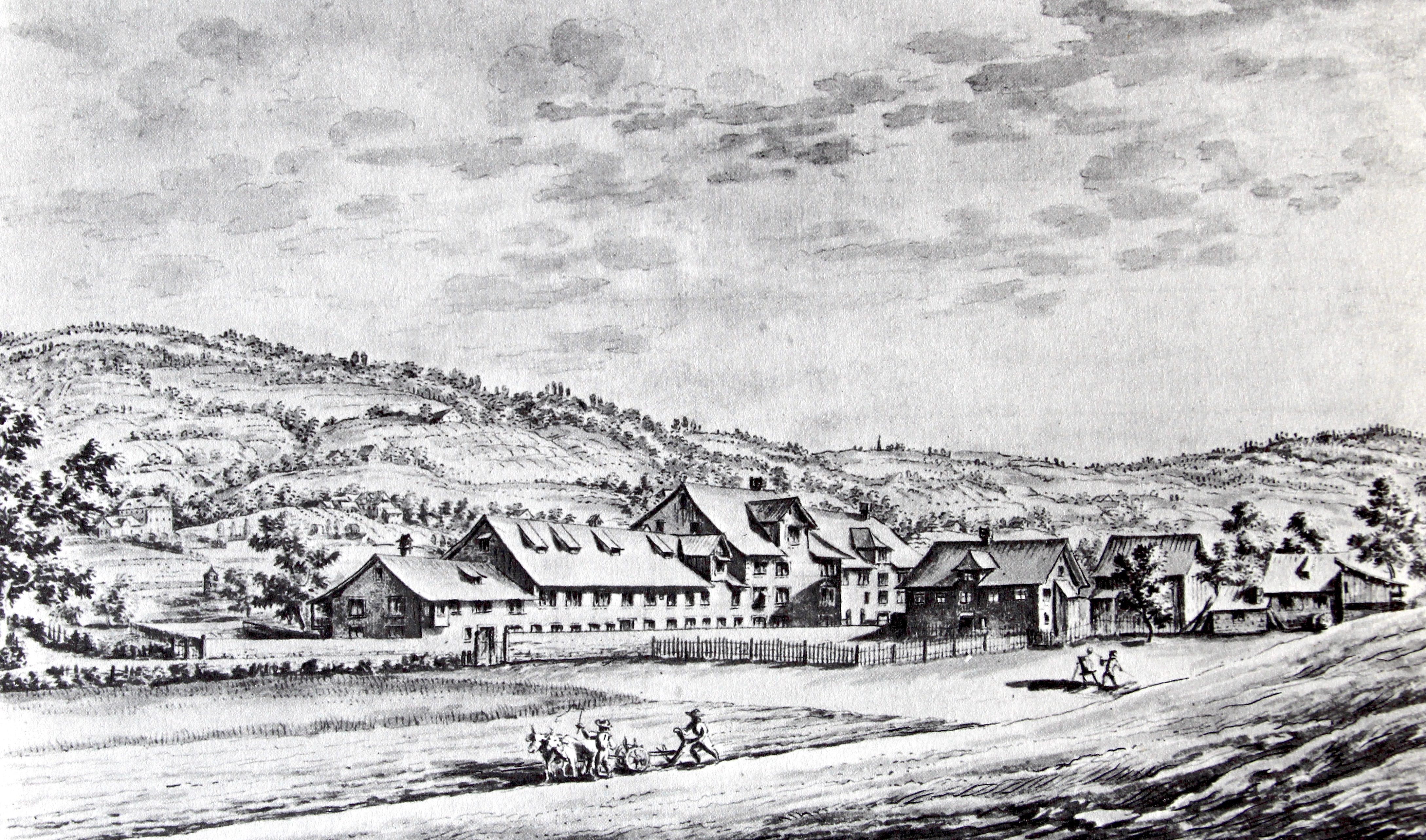 Zeltweg in Zürich Hottingen, 1779, Blick nach Südosten